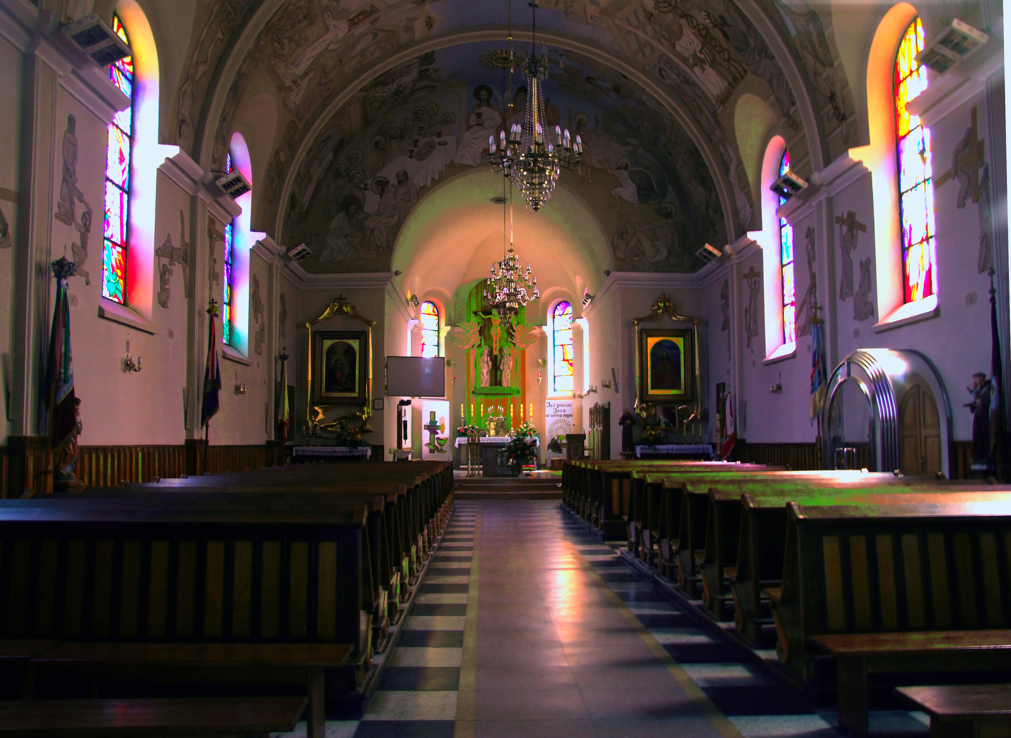 Iwkowa - kościół Podwyższenia Krzyża Świętego